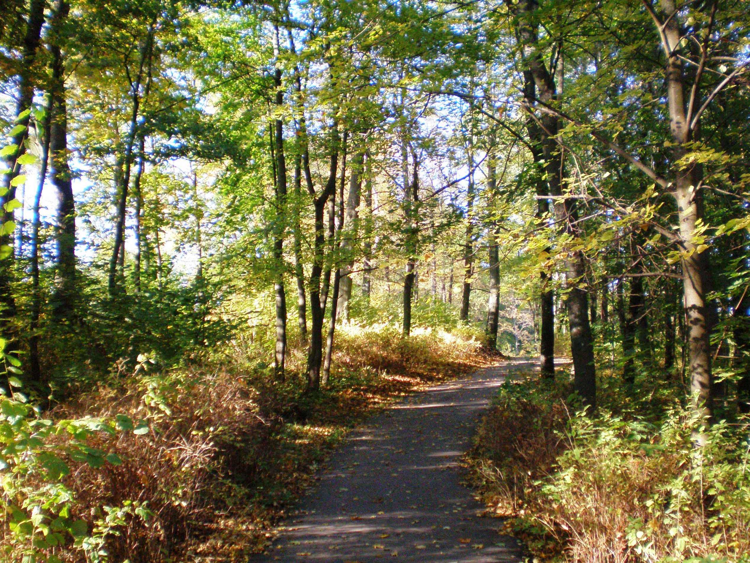 Kėdainių parkas rudenį